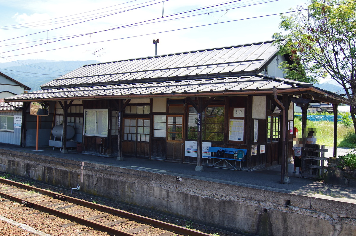 信濃竹原駅木造駅舎